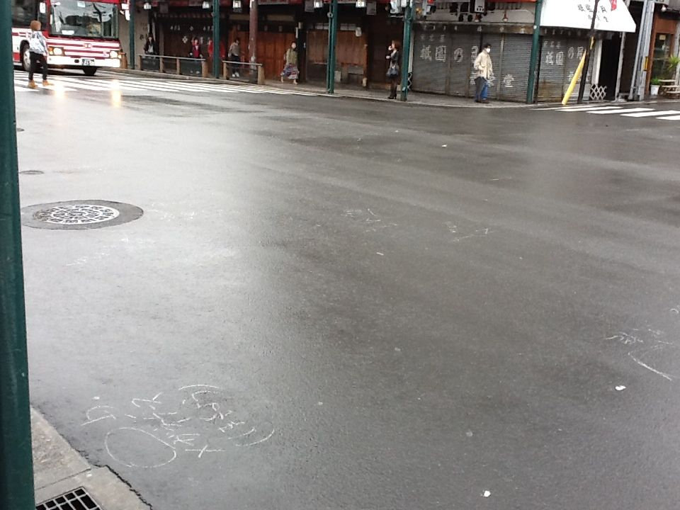 京都市祇園暴走事故の現場-2 事故の2日後の朝 写真右手側から左手側へ暴走車は通過した。 路面には被害者が倒れていた跡がチョークで記載されている。